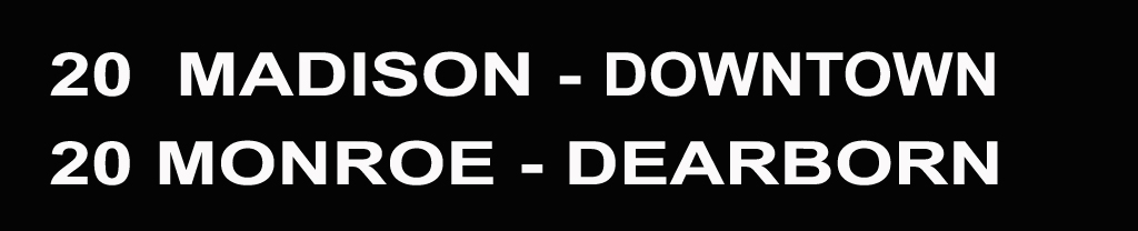 Zelfgemaakte media in Photoshop CS